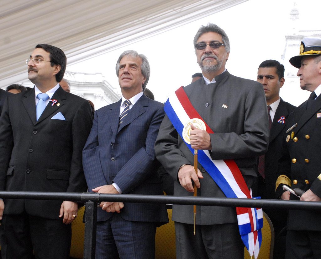 Los presidentes Tabaré Vázquez de Uruguay y Fernando lugo de Paraguay, en el palco oficial frente al palacio de López, observando el desfile militar por el dia de la independencia del Paraguay.